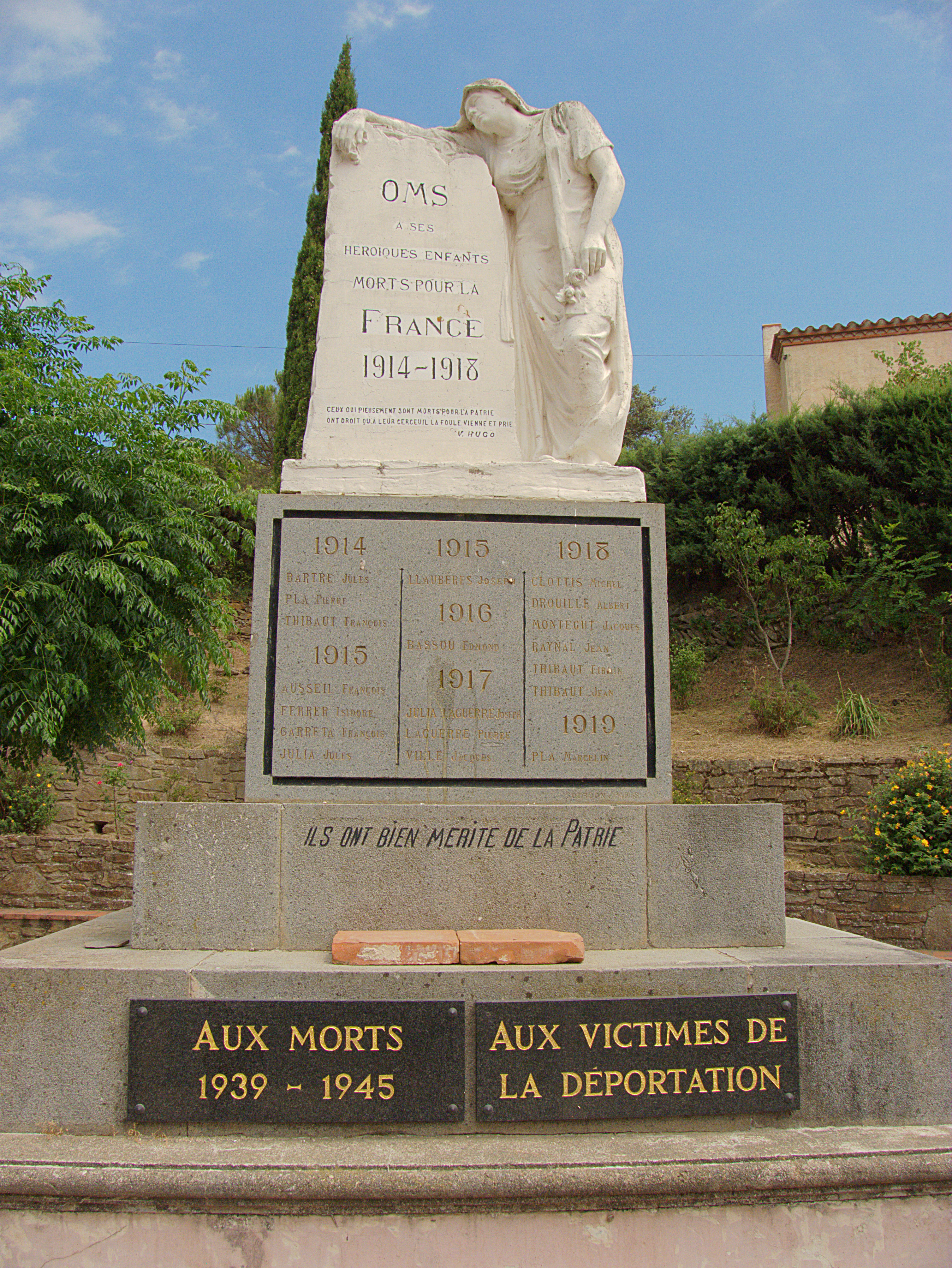 Monument aux morts, Oms (Pyrénées-Orientales, Languedoc-Roussillon, France)